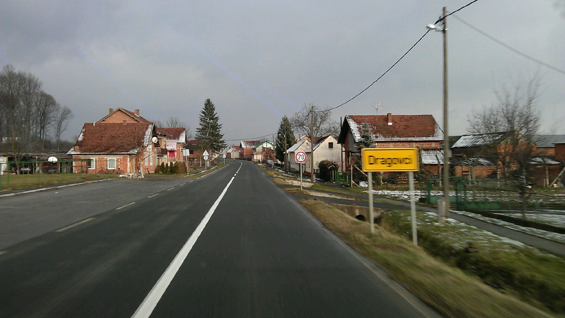 Dragovci